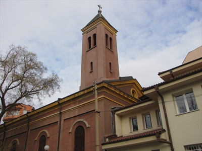 Църква в Пловдив